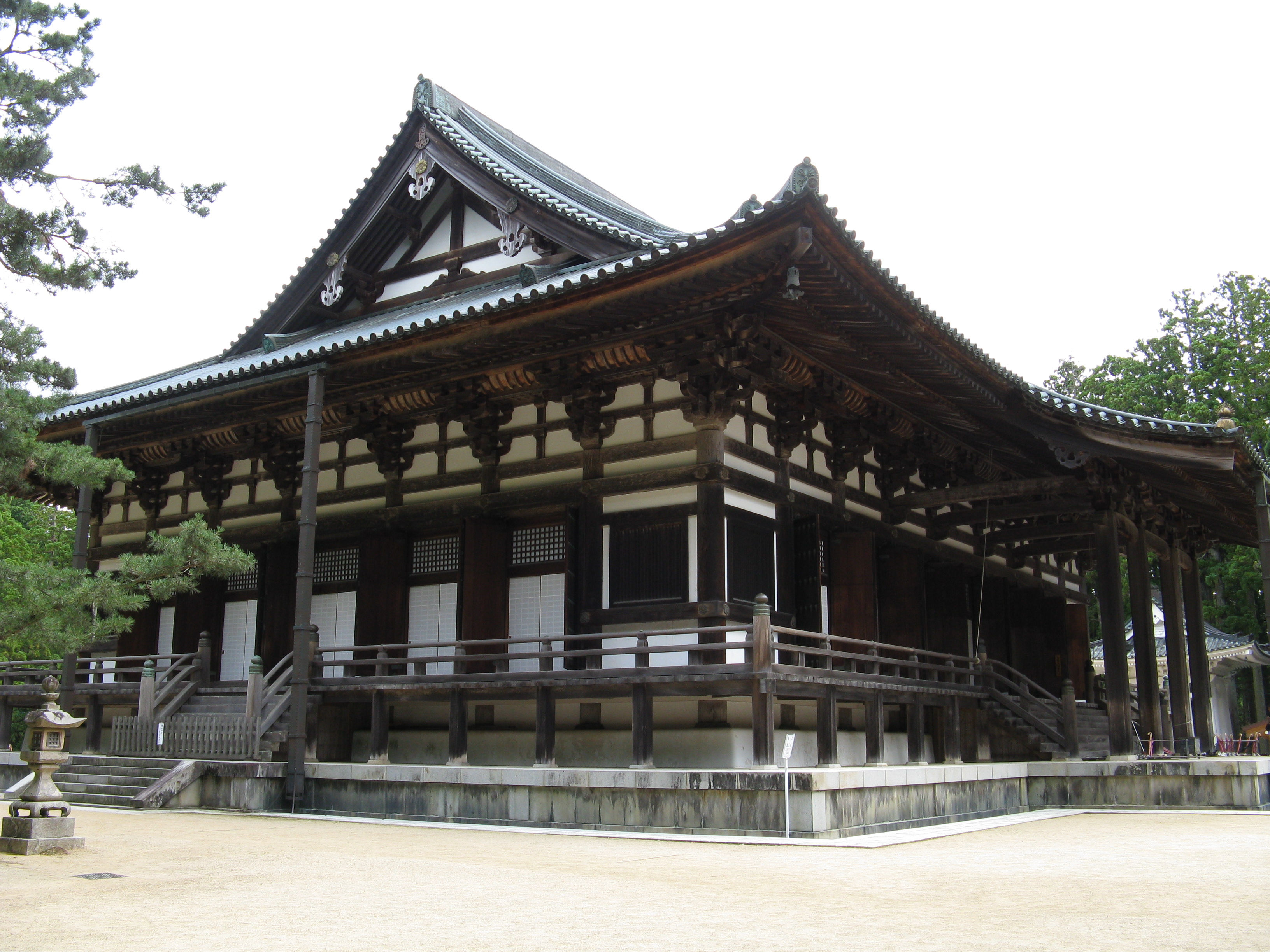 高野山 壇場伽藍 金堂